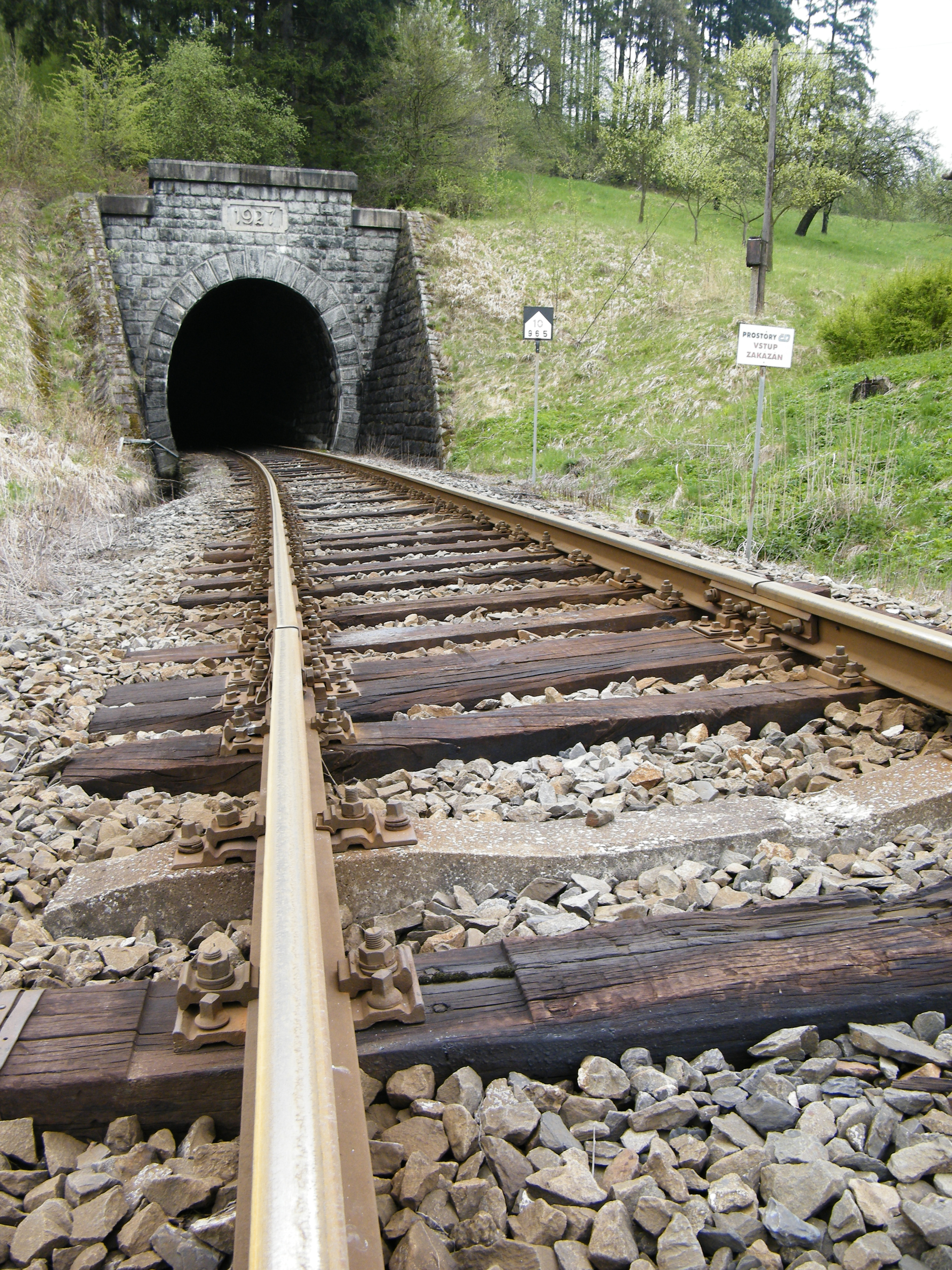 Navojna. Train station and tunnel.